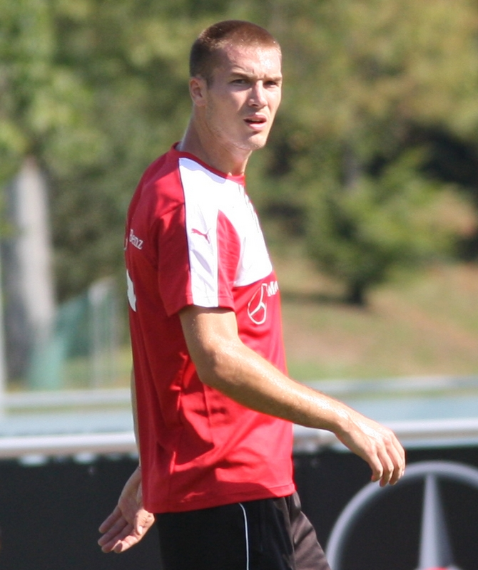 Toni Sunjic bei seinem ersten öffentlichen VfB-Training. Bild von